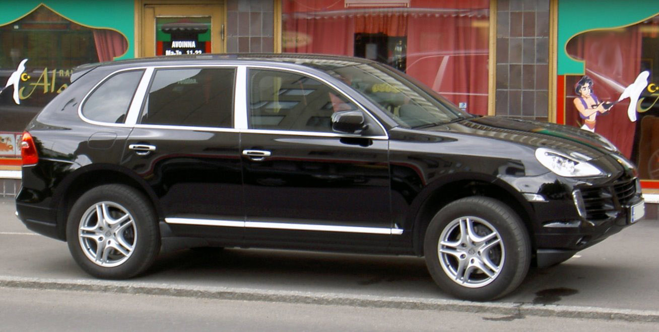 Porsche Cayenne